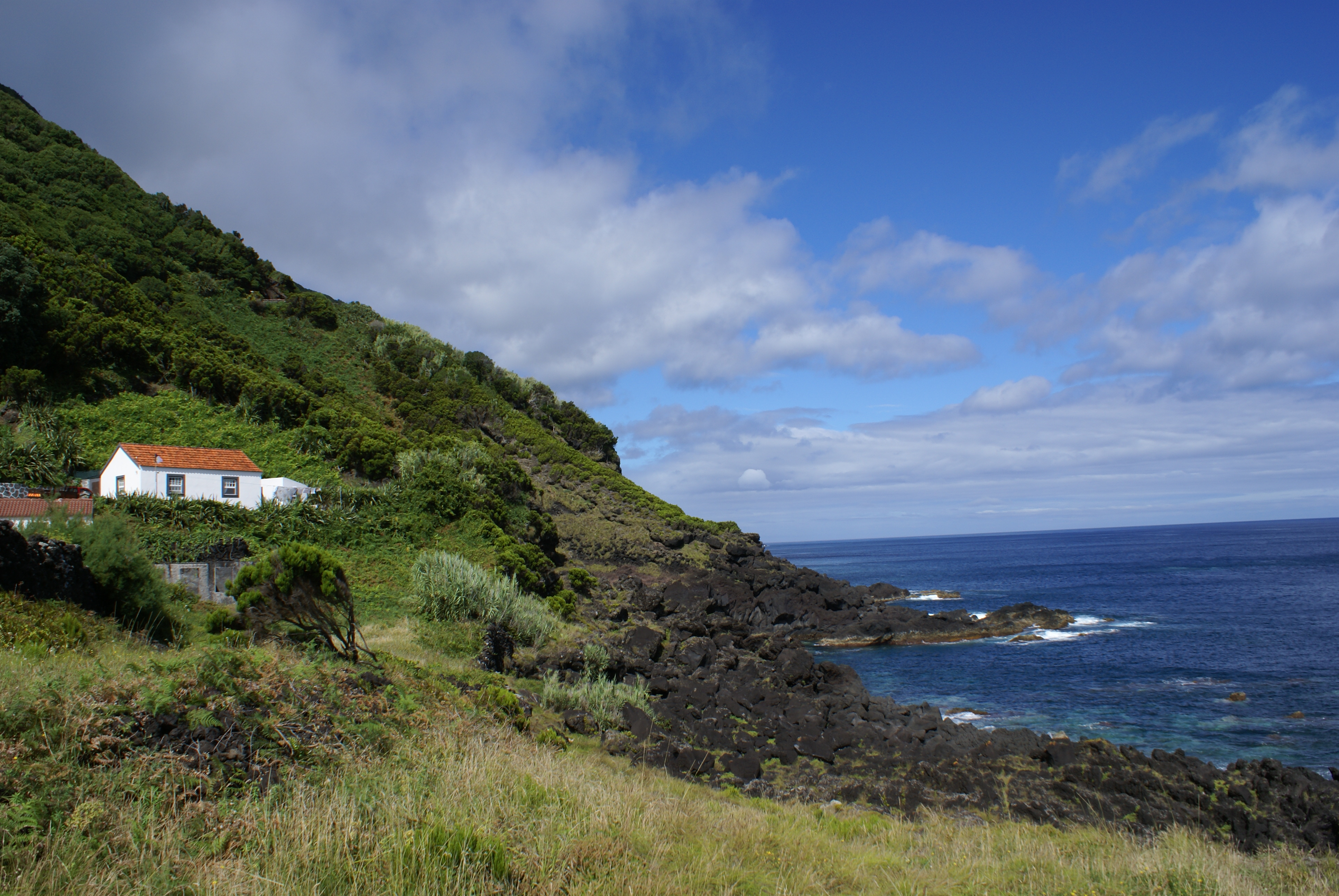 Fajã das Pontas, Norte Pqueno, Calheta, ilha de São Jorge, Açores